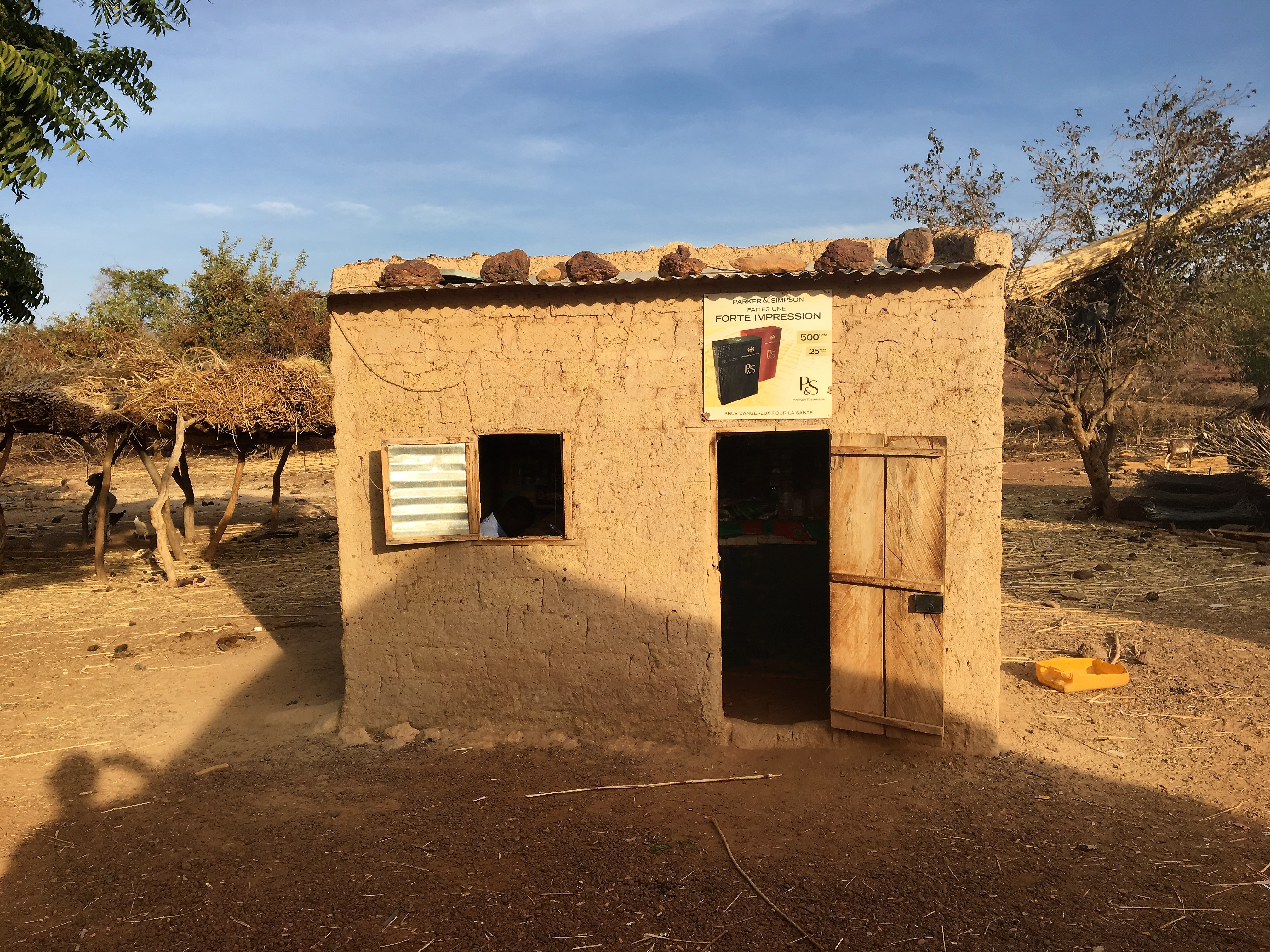 Petit commerce de Bogonam Peulh